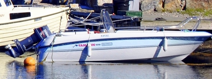 Yamarin 4510, boat.